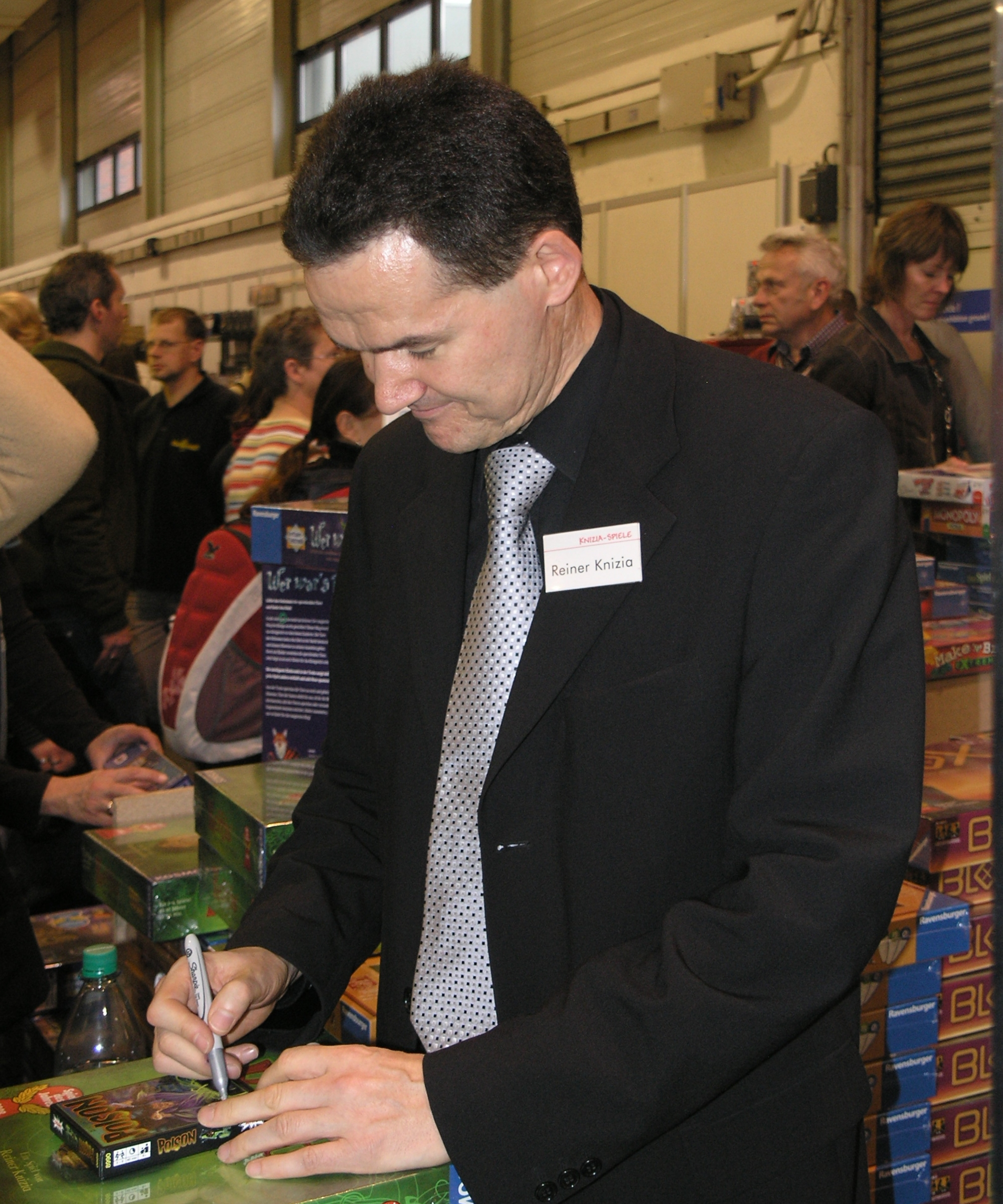 Internationalen Spieltage SPIEL 2008